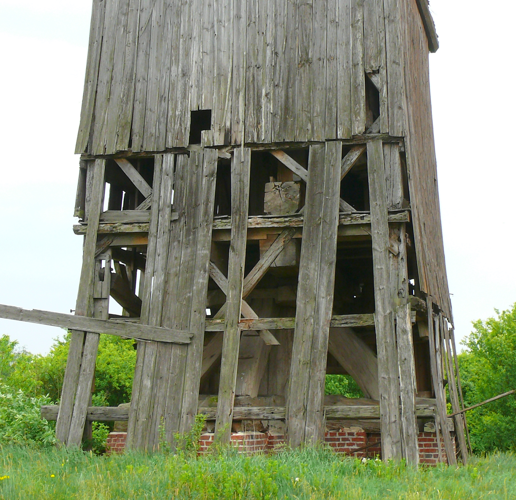 Zniszczony wiatrak w Krzywiniu, widoczny kozioł.